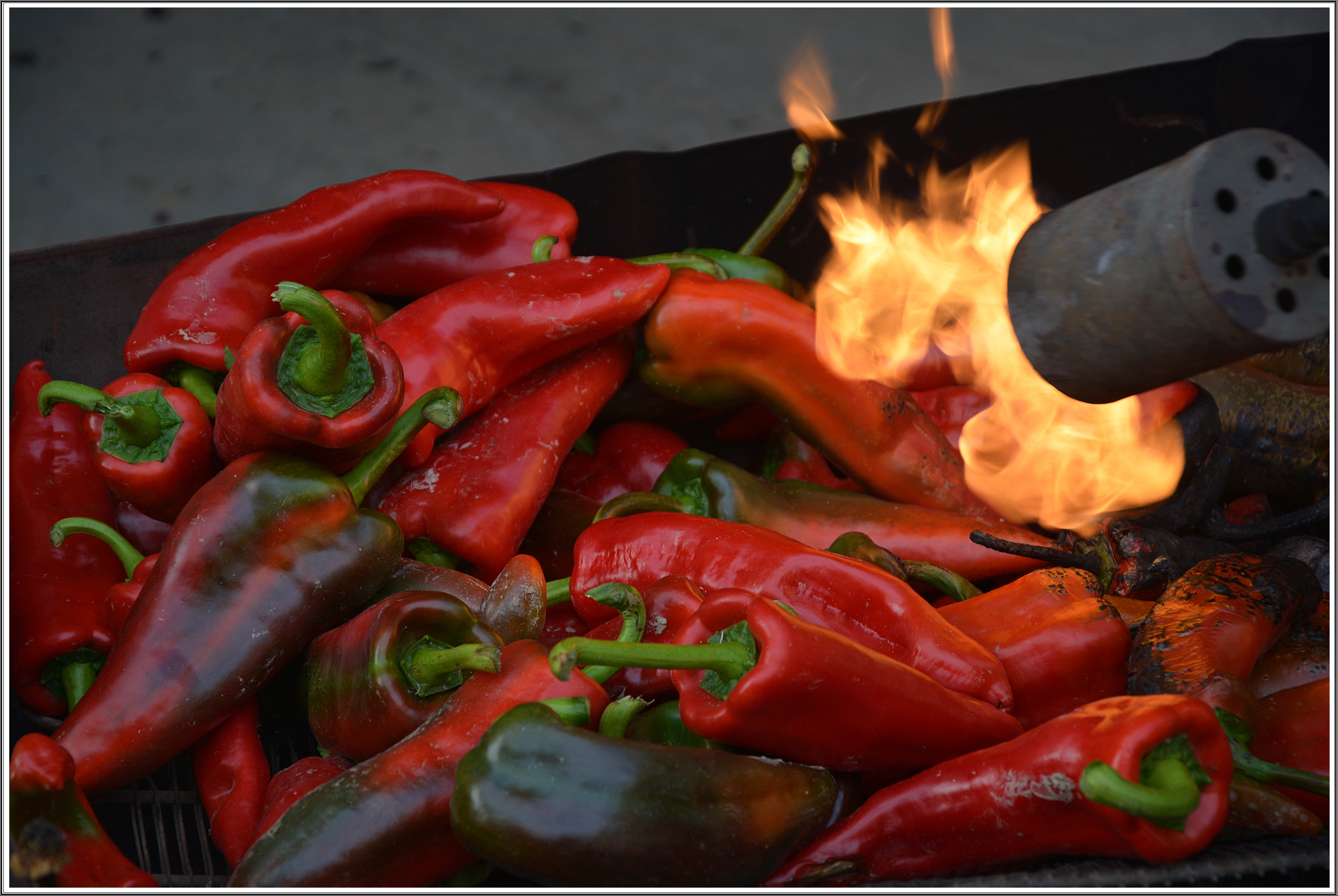 La Rioja, España.